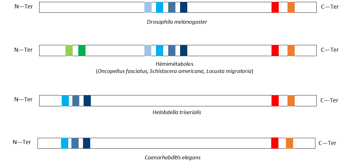 schéma comparant les protéines HB au niveau de la position et de la similitude des domaines en doigt de zinc chez différentes espèces d'insectes